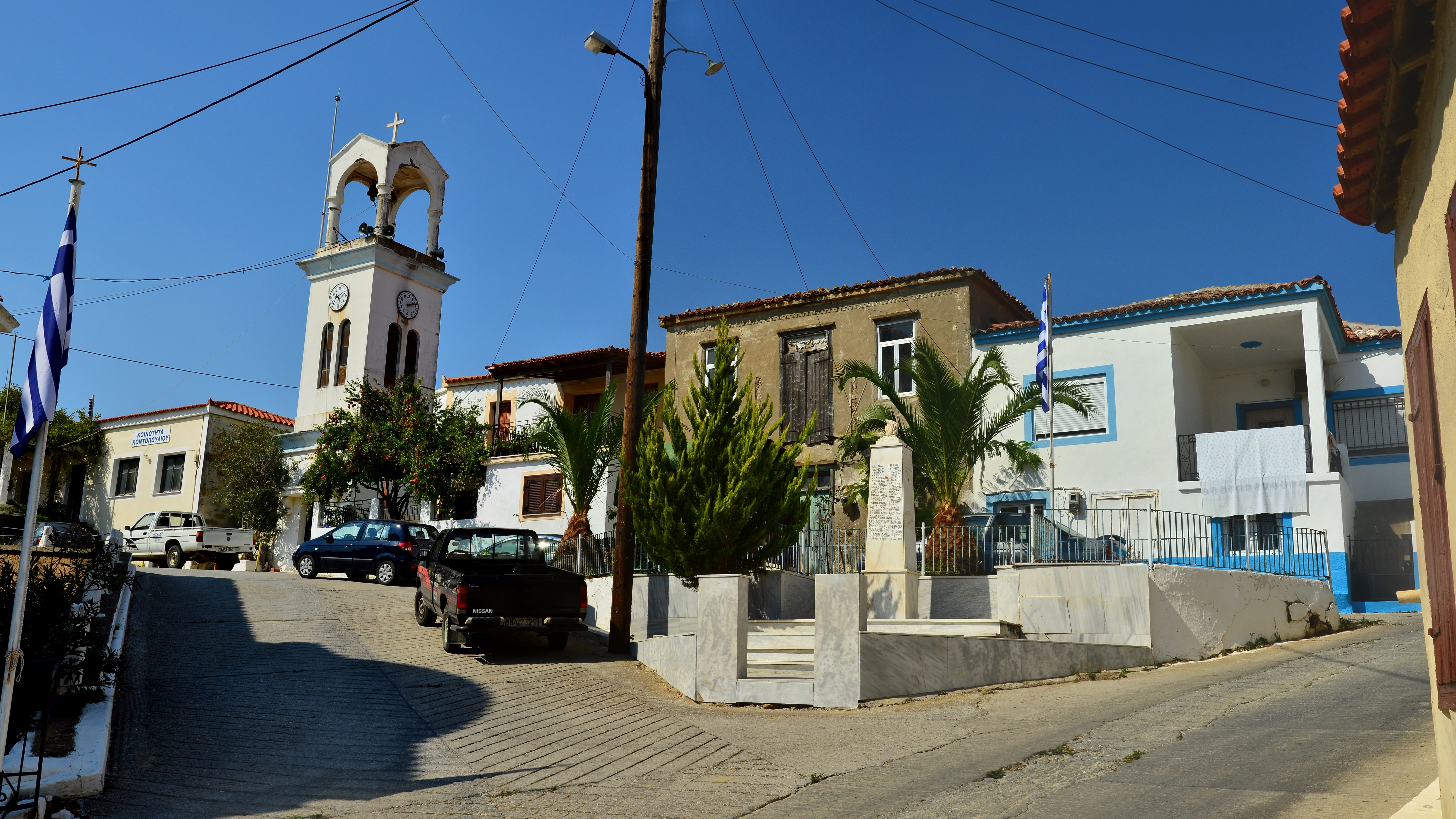 Κοντοπούλι Λήμνου